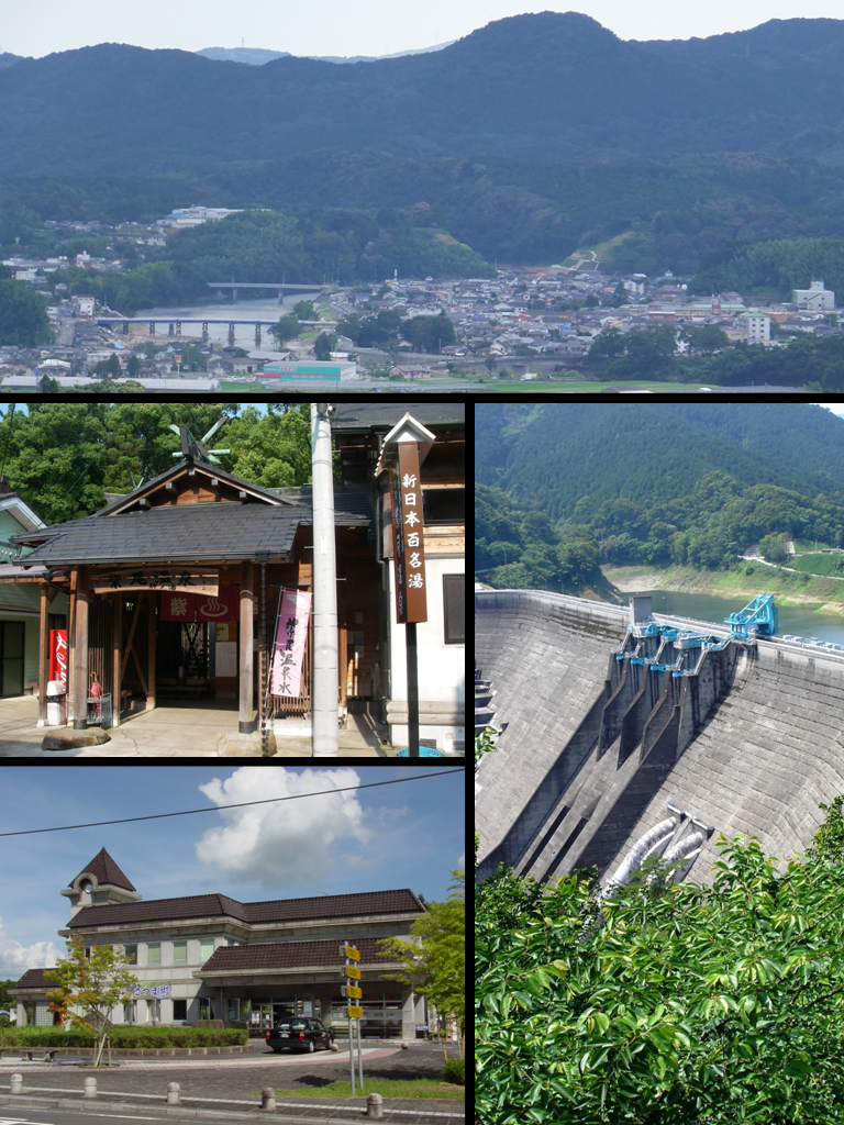 [上]さつま町市街，[左上]紫尾区営温泉，[左下]宮之城鉄道記念館，[右]鶴田ダム